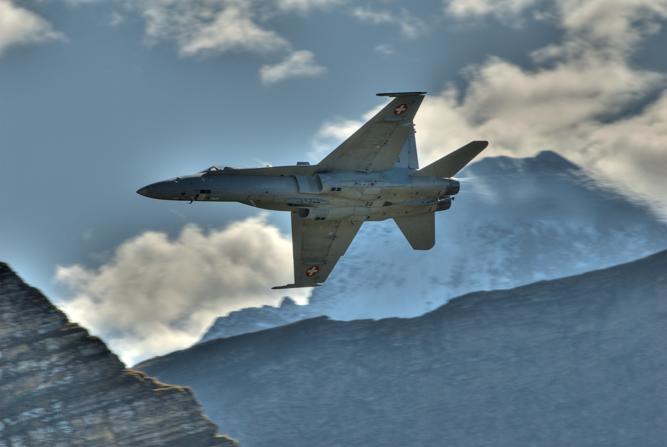 Axalp Airshow 2009